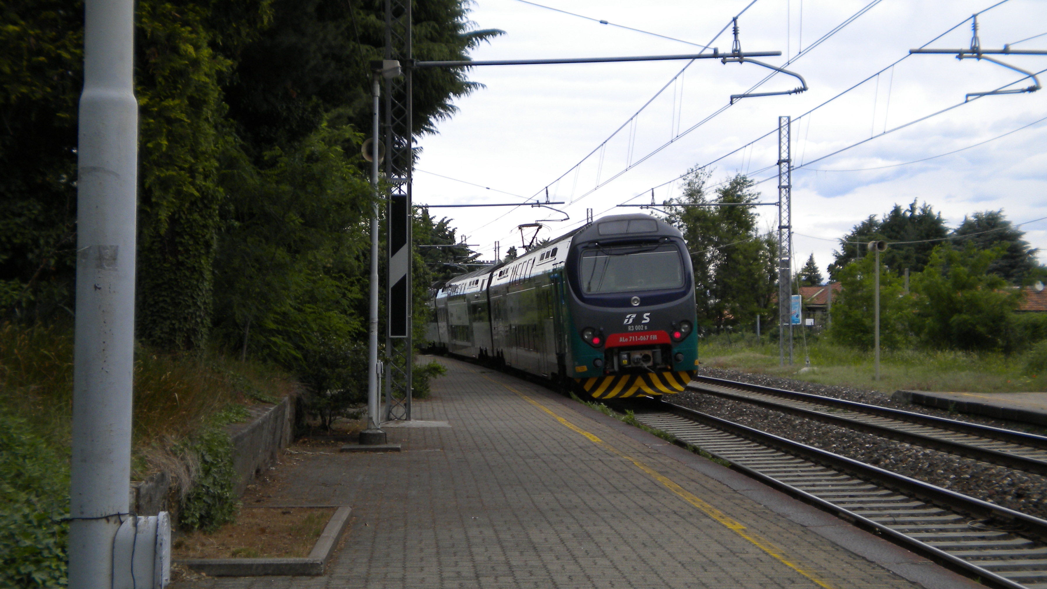 Un treno TSR in partenza da Cavaria.